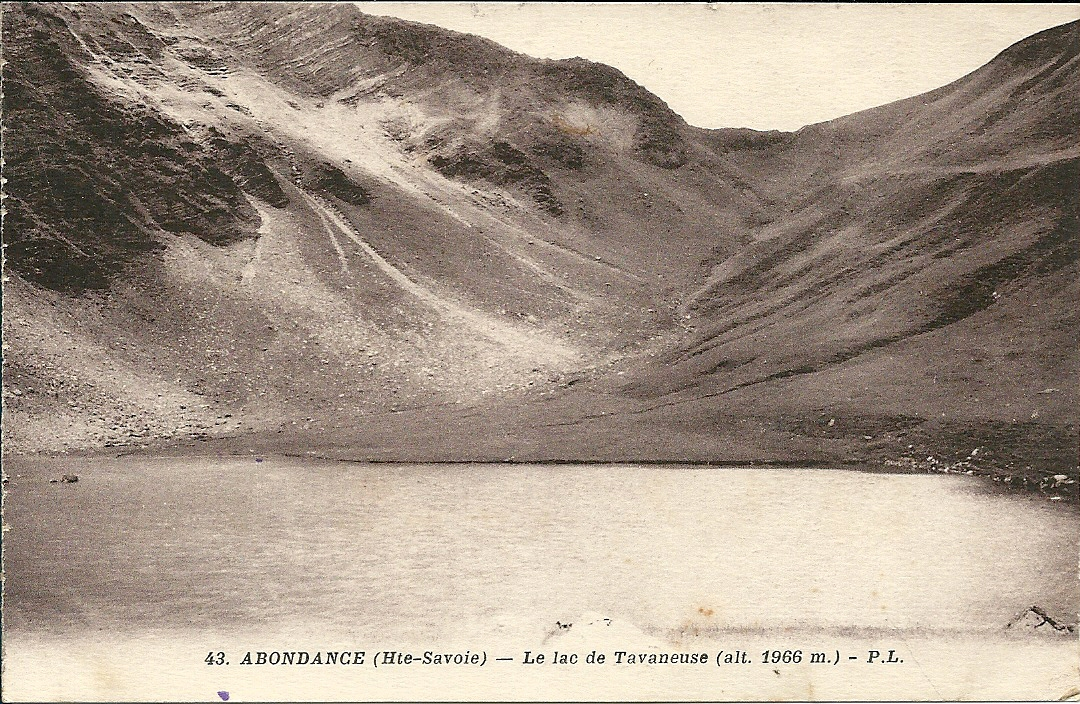 Abondance (Haute-Savoie) - Lac de Tavaneuse - vers 1935